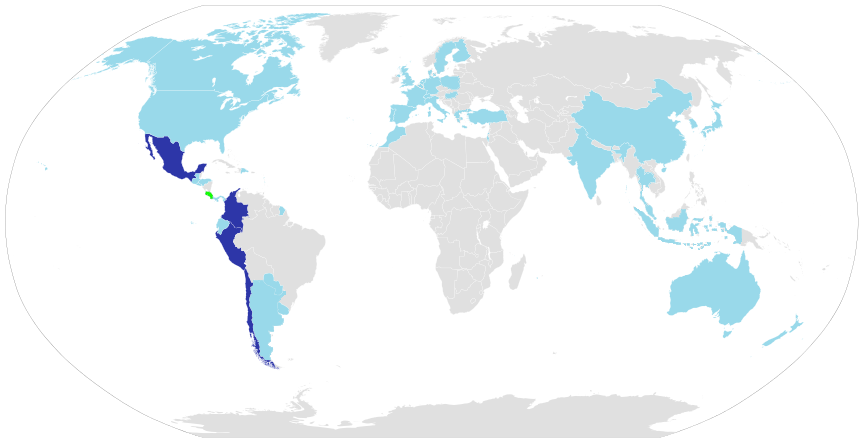 Mapa de la Alianza del Pacífico 2016